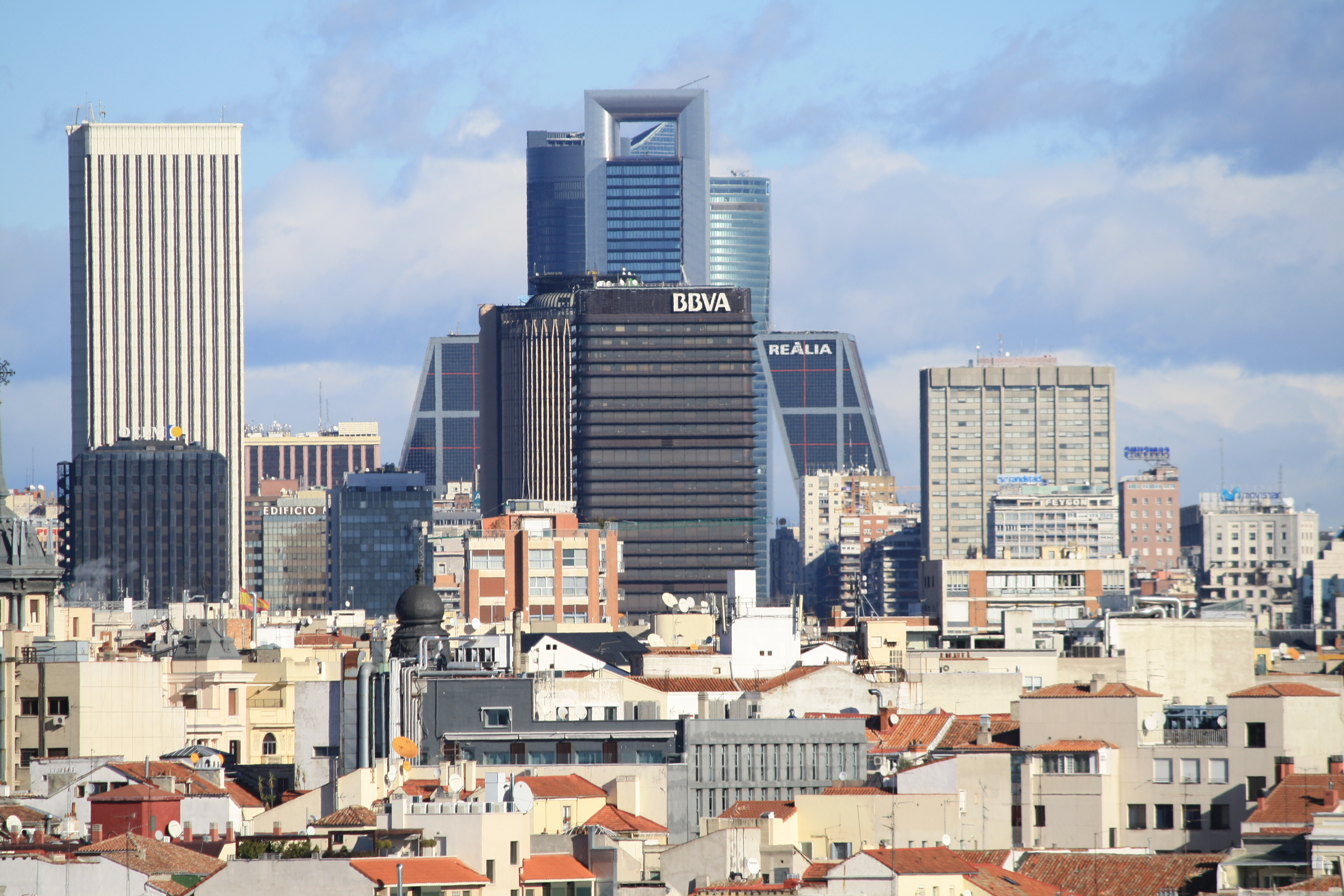 Torre Picasso, Torre BBVA, Torre Caja Madrid, Torres Kio, Cuatro Torres Business Area. Tomada desde la azotea del Círculo de Bellas Artes Madrid Comunidad de Madrid España